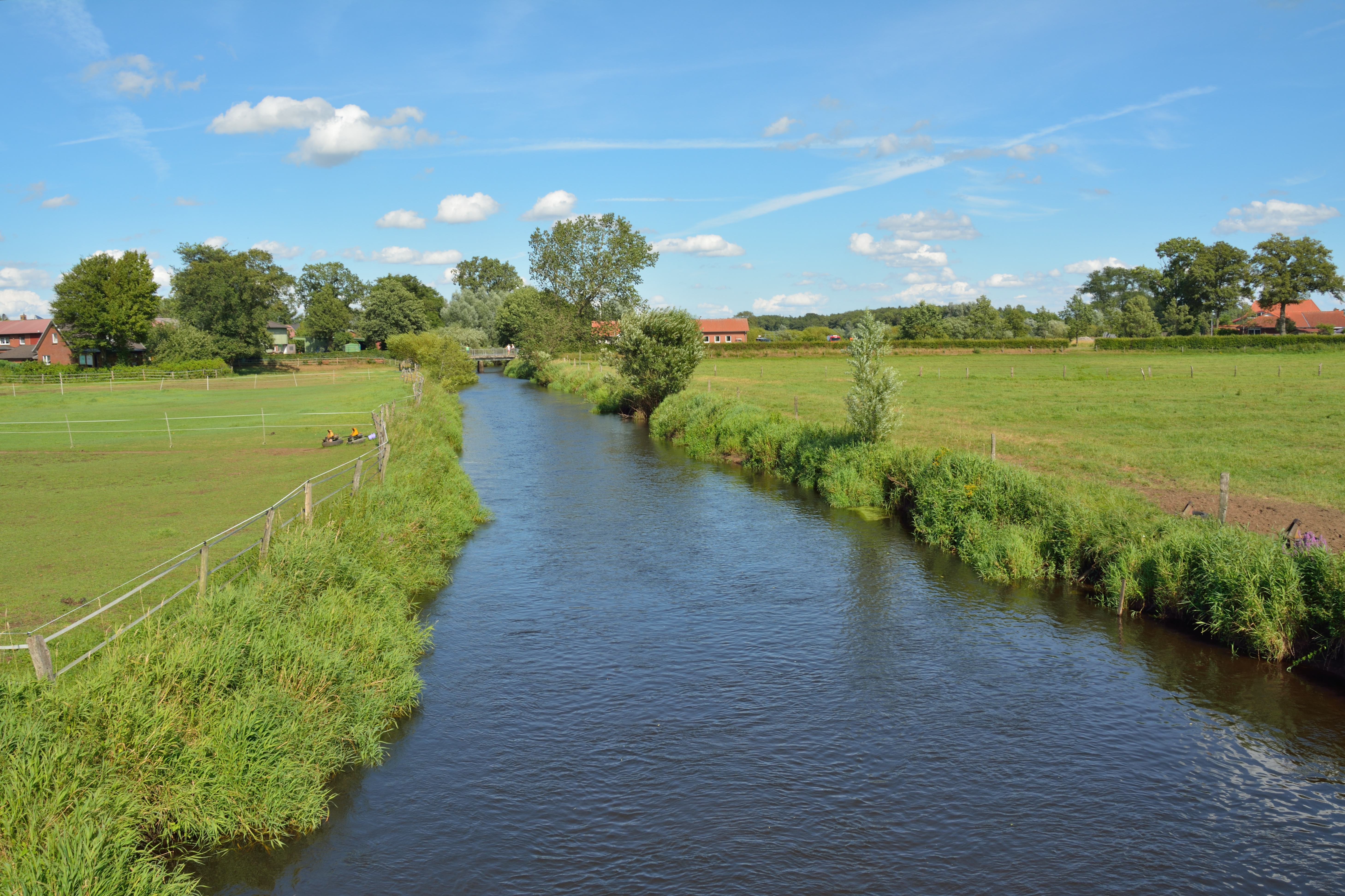 Die Bramau in Föhrden-Barl, ein Kanurevier